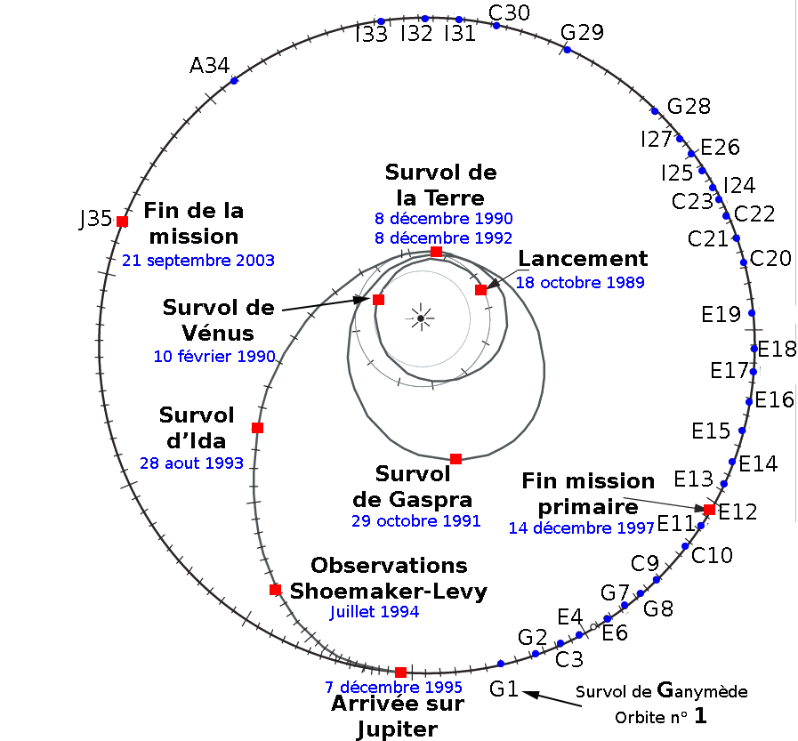 Principaux événements de la mission spatiale Galileo. Libellés en francais